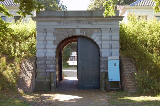 Toegangspoort (1783) van Fort Wierickerschans, Bodegraven